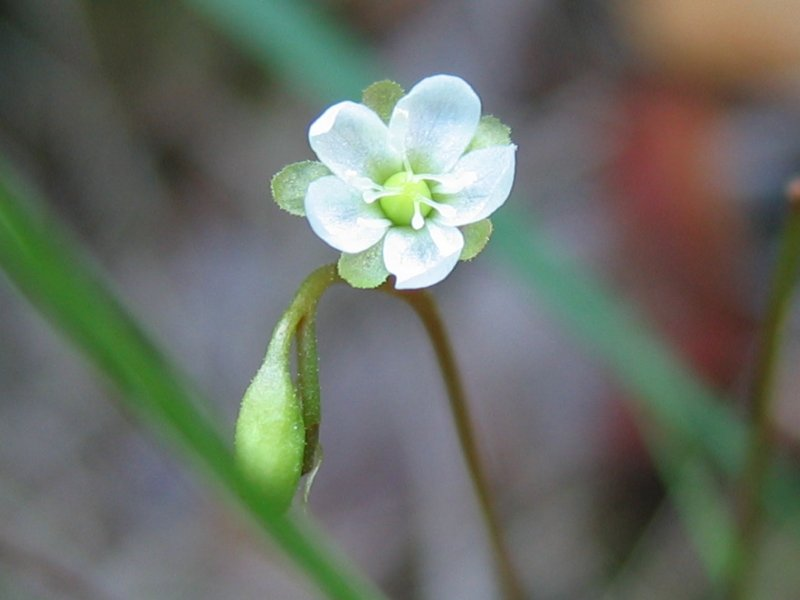 Rundblättriger Sonnentau (Drosera rotundifolia), Blüte